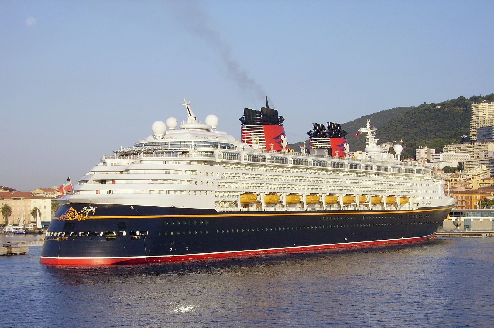 Le paquebot Disney Magic au port d'Ajaccio le 17 juillet 2011. IMO Number: 9126807 MMSI Number: 308516000 Call sign: C6PT7 Length: 294.00 m Beam: 32.20 m